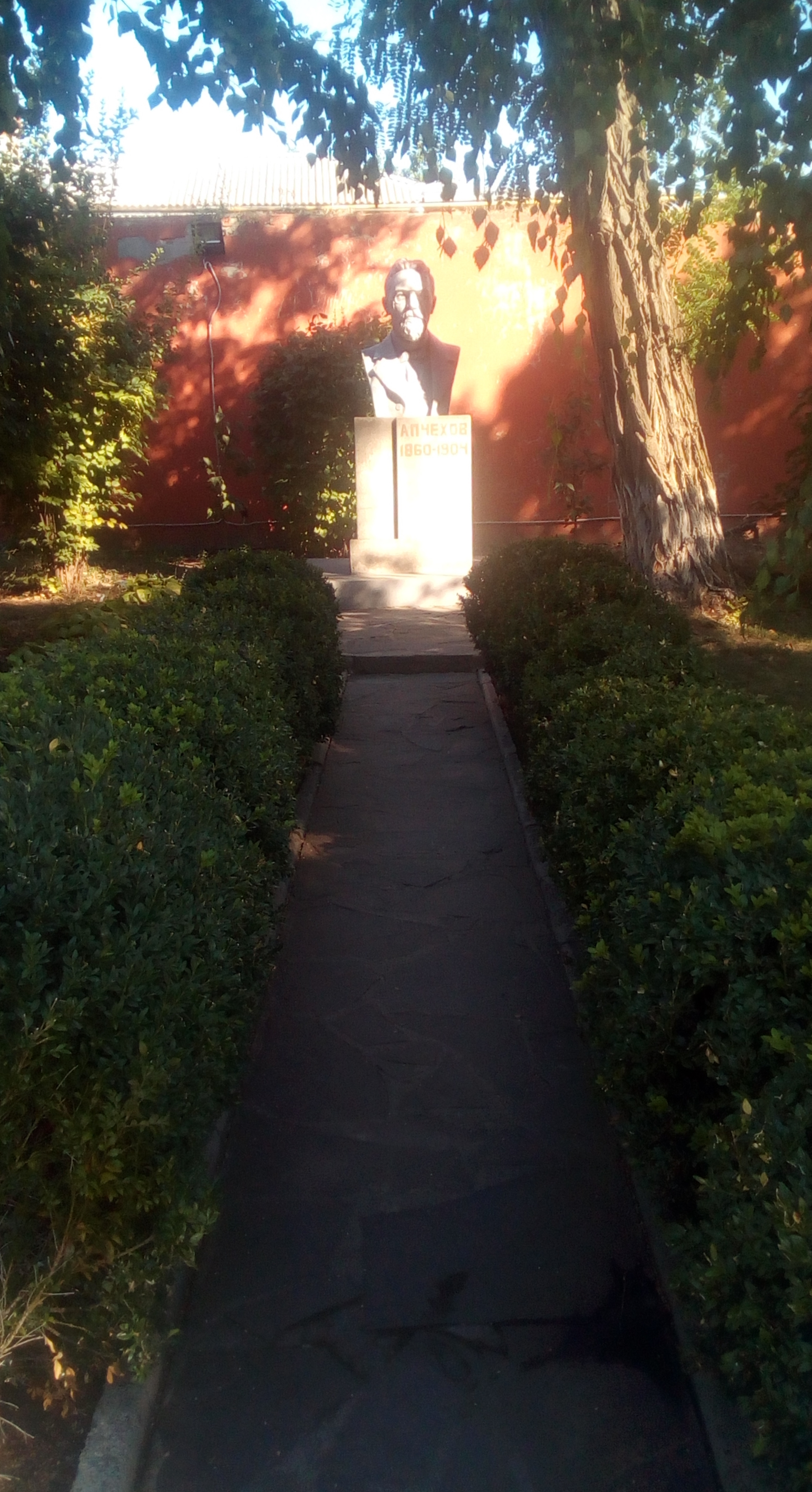 Бюст писателю.